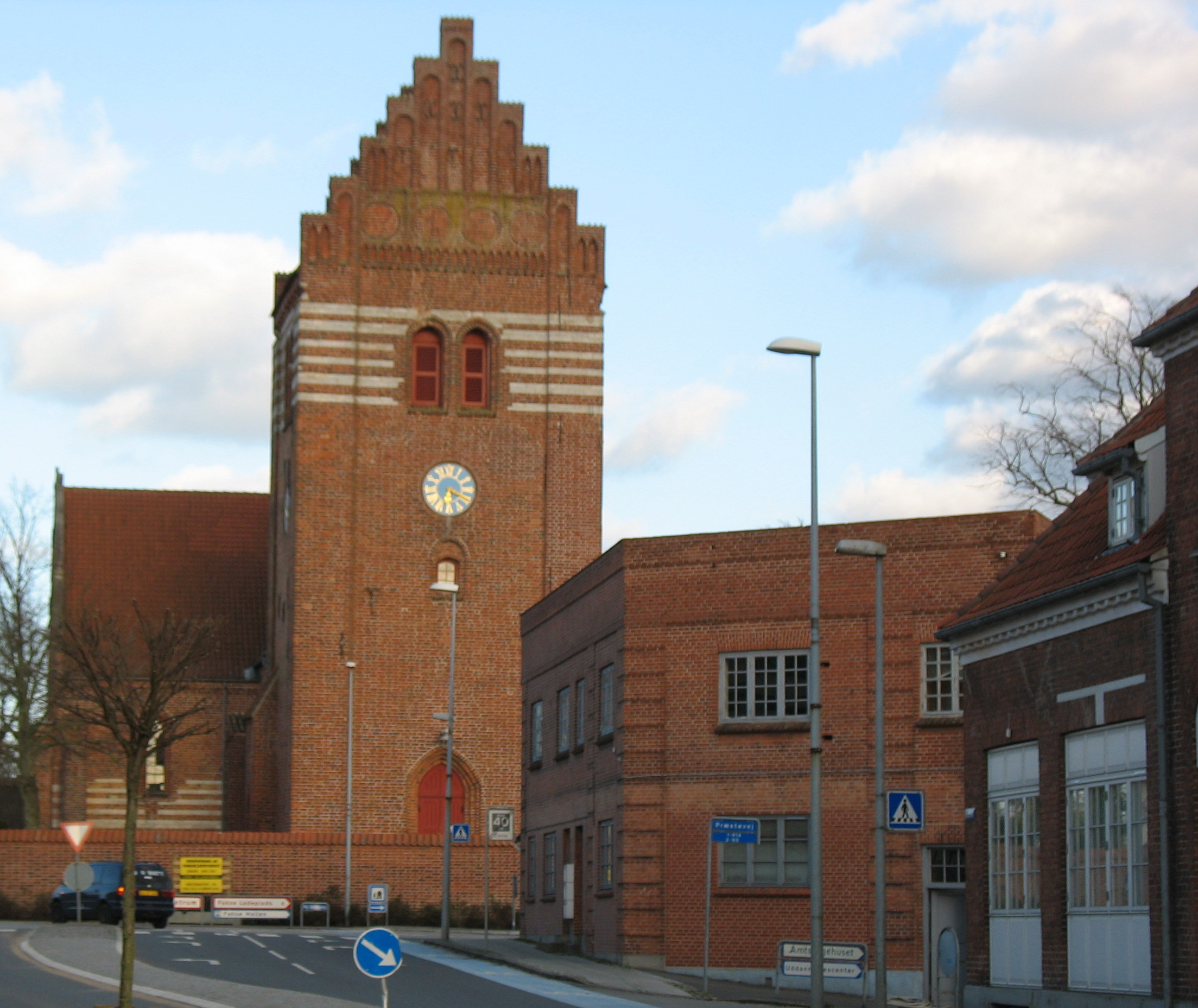 Faxe Kirke